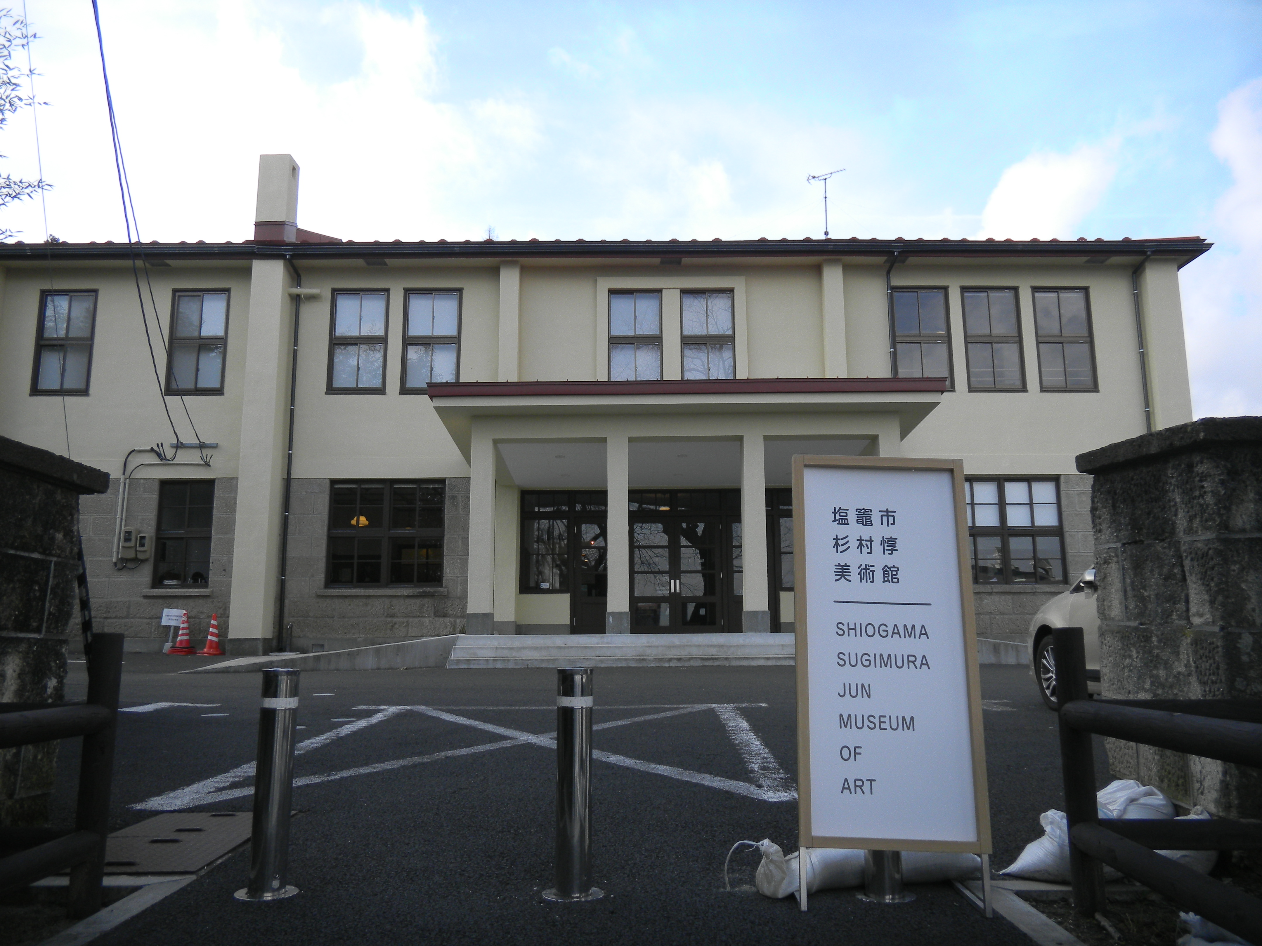 塩竈市杉村惇美術館